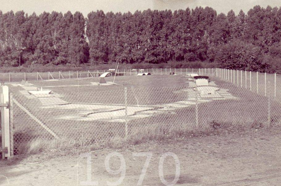 Minigolfplatz in Hamburg Horn um 1970